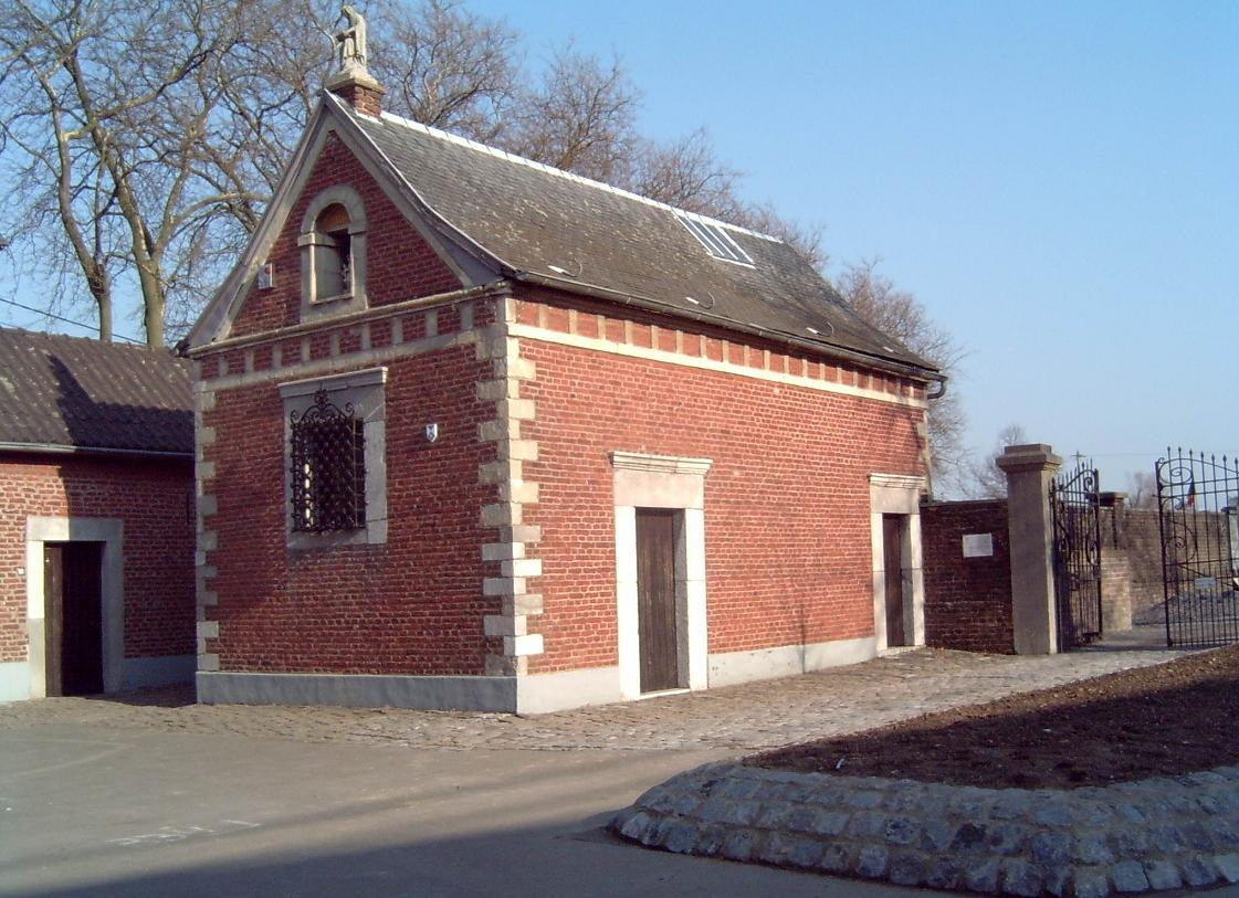 Limburgs: Visé, Lorette-kapel foto: Els Diederen 2003 Aelske 27 feb 2007 10:36 (CET)